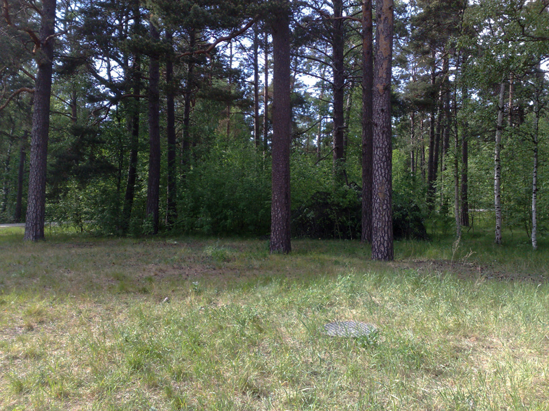 Naamioitu Suomen armeijan puolijoukkueteltta.